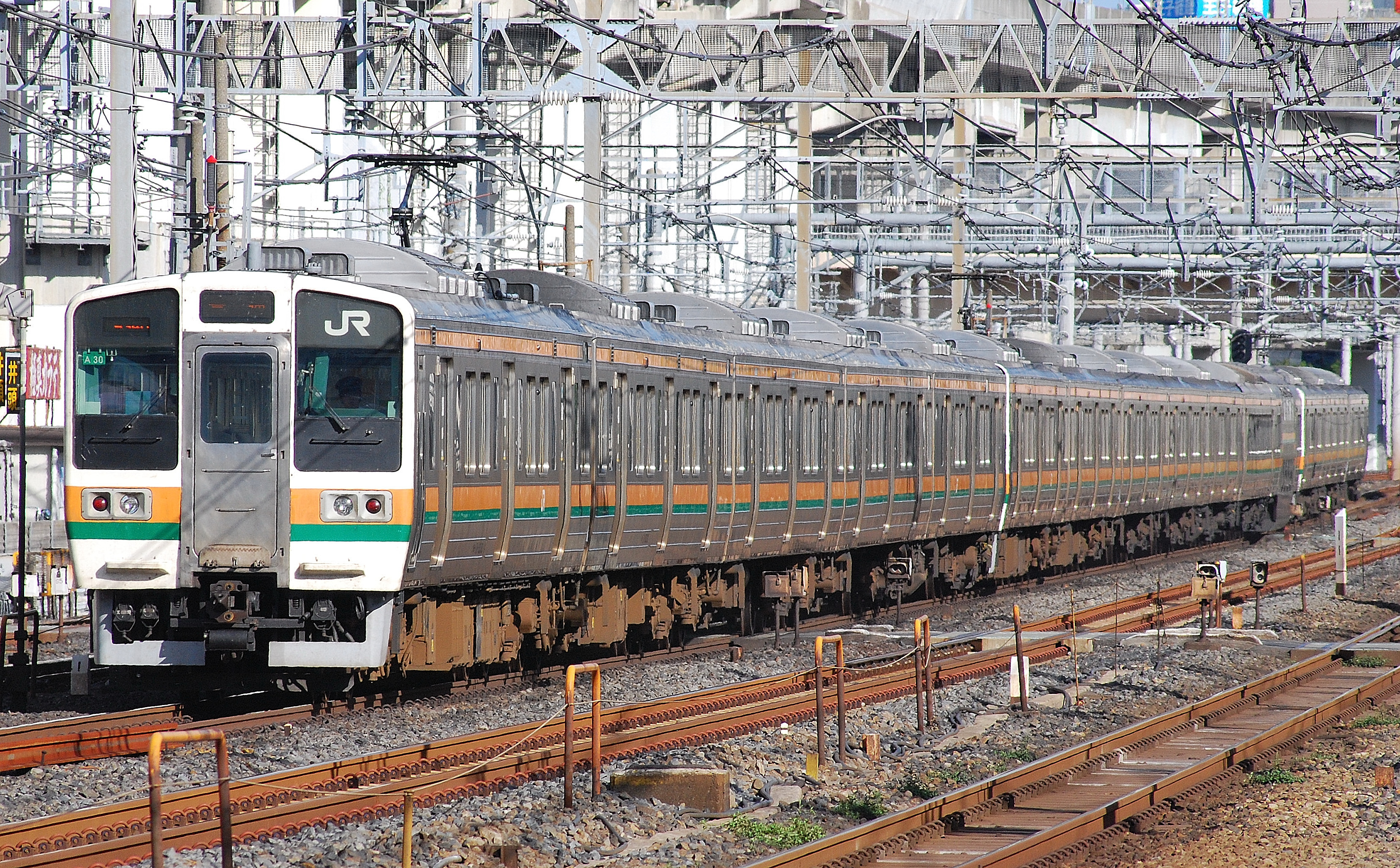 JR東日本高崎車両センター所属の211系3000番台のA30編成5両（左側）とC編成10両（右側）（公道から撮影）